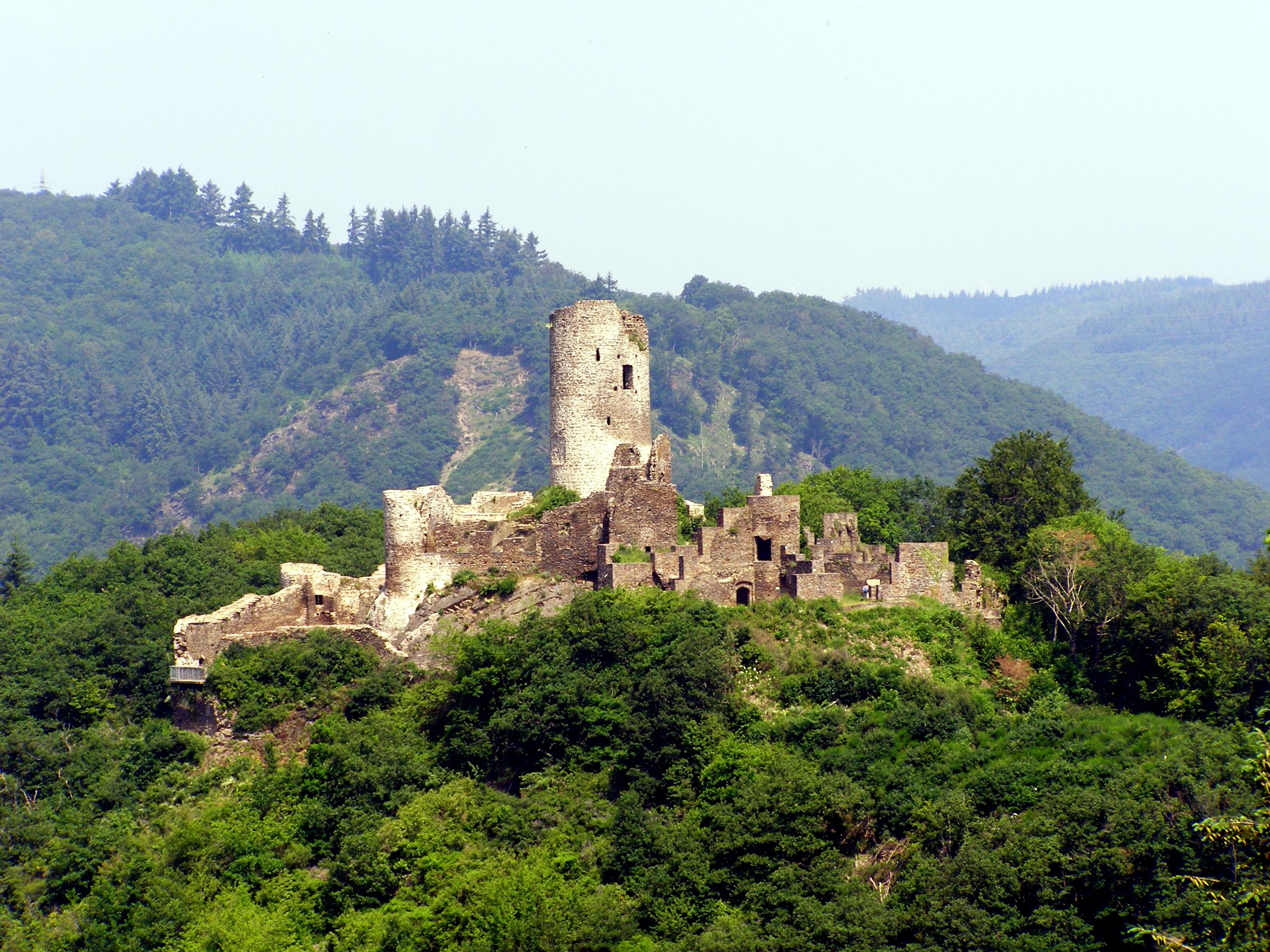 Ruine Winneburg bei Cochem/Mosel; aufgenommen Juni 2006, von der Wilhelmshöhe